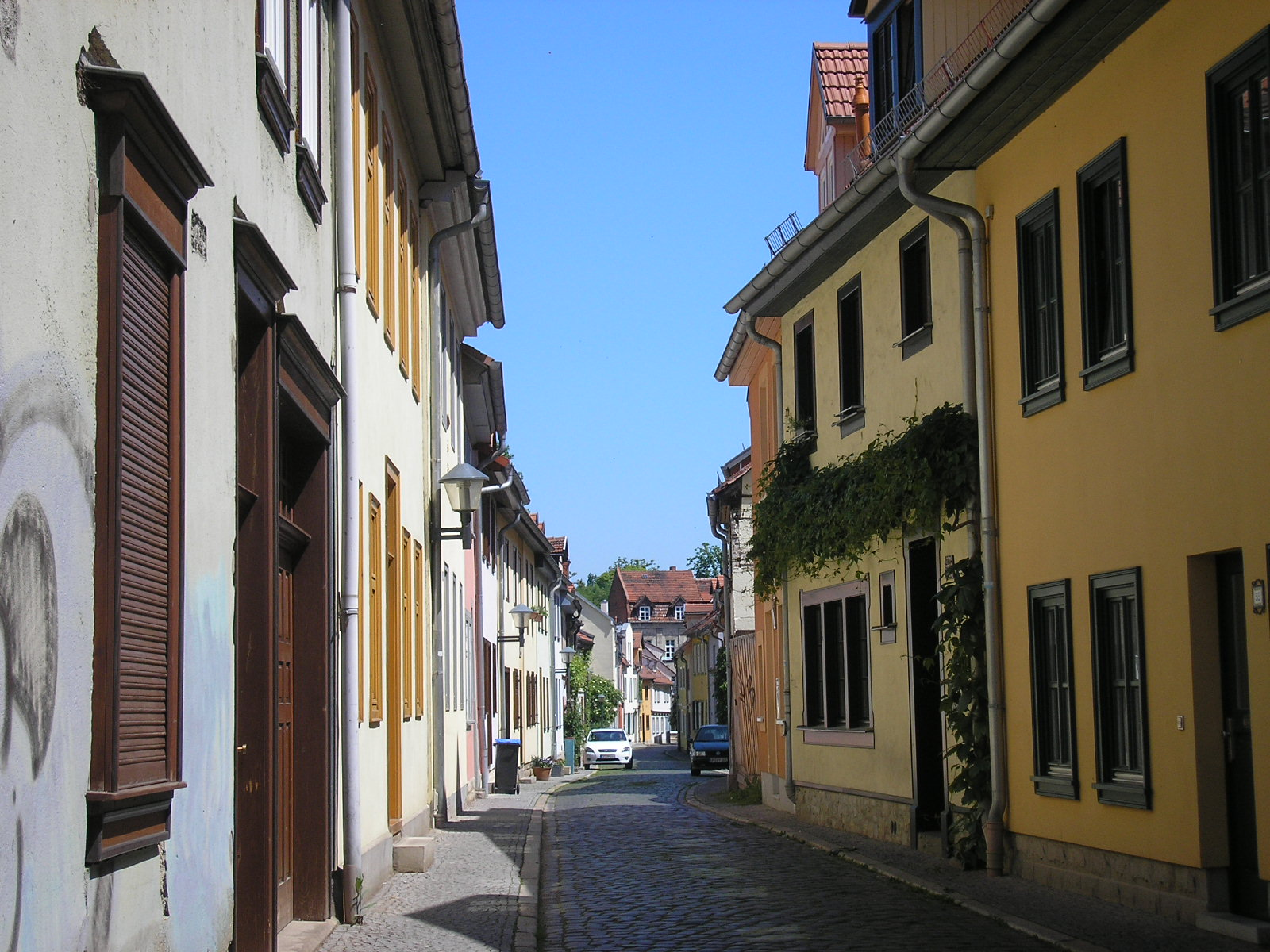 Blick durch die Glockengasse im Andreasviertel in Erfurt.